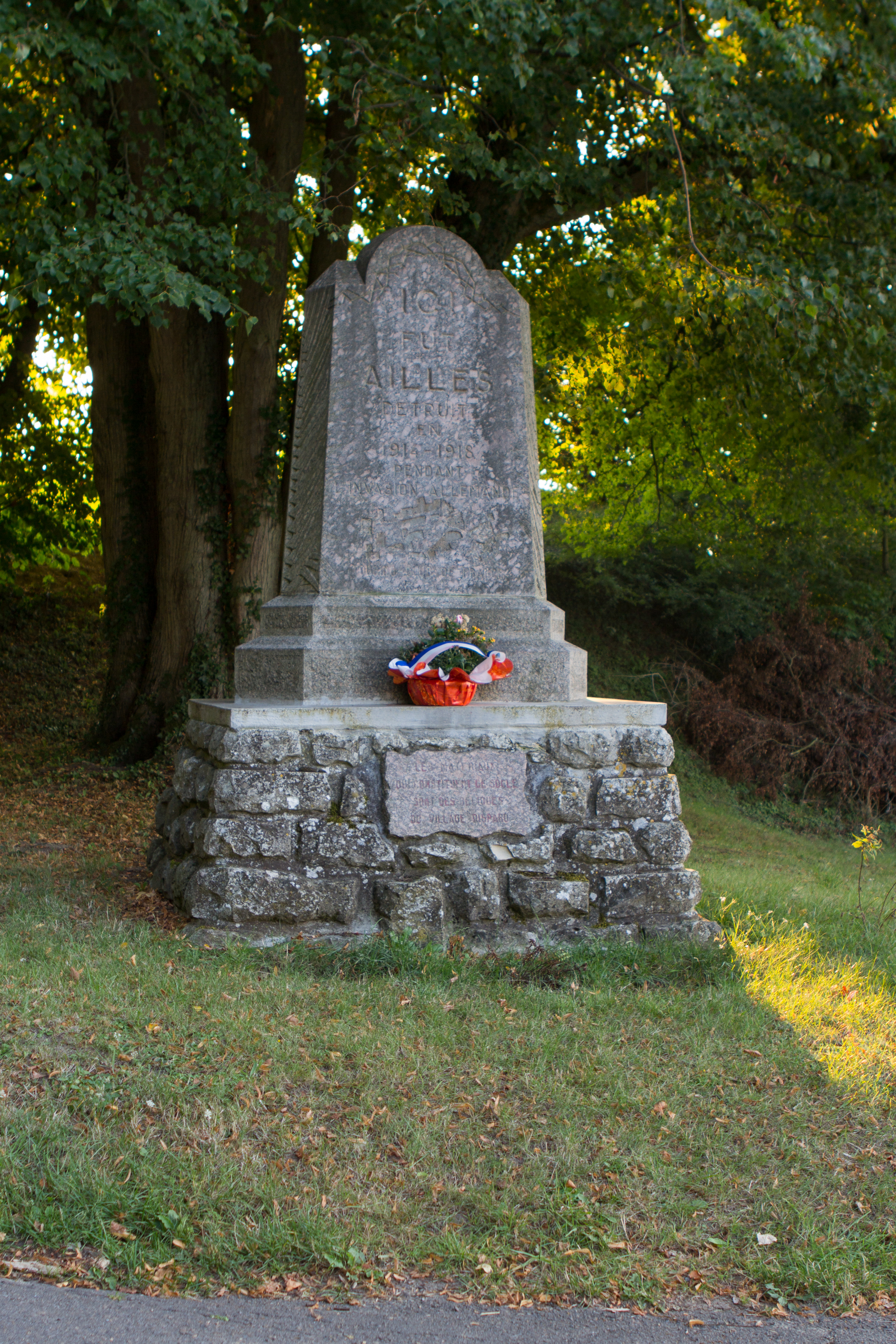 Mémorial en souvenir de l'ancien village d'Ailles (absorbé en 1923 par la commune de Chermizy) / Chermizy-Ailles / Aisne / France